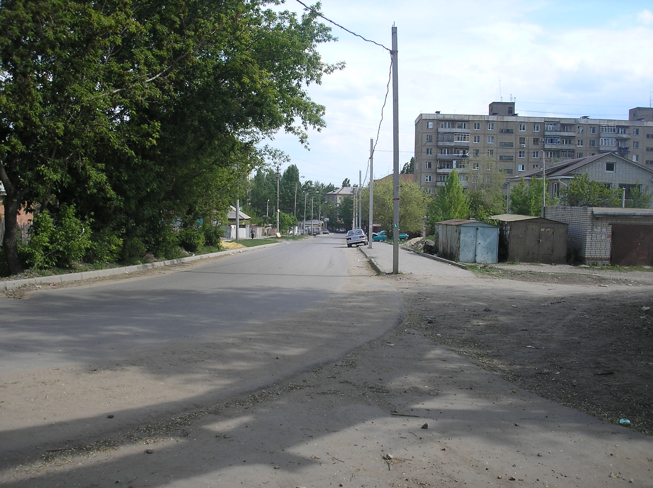 Московская улица, пересечение с Краевой, Саратов